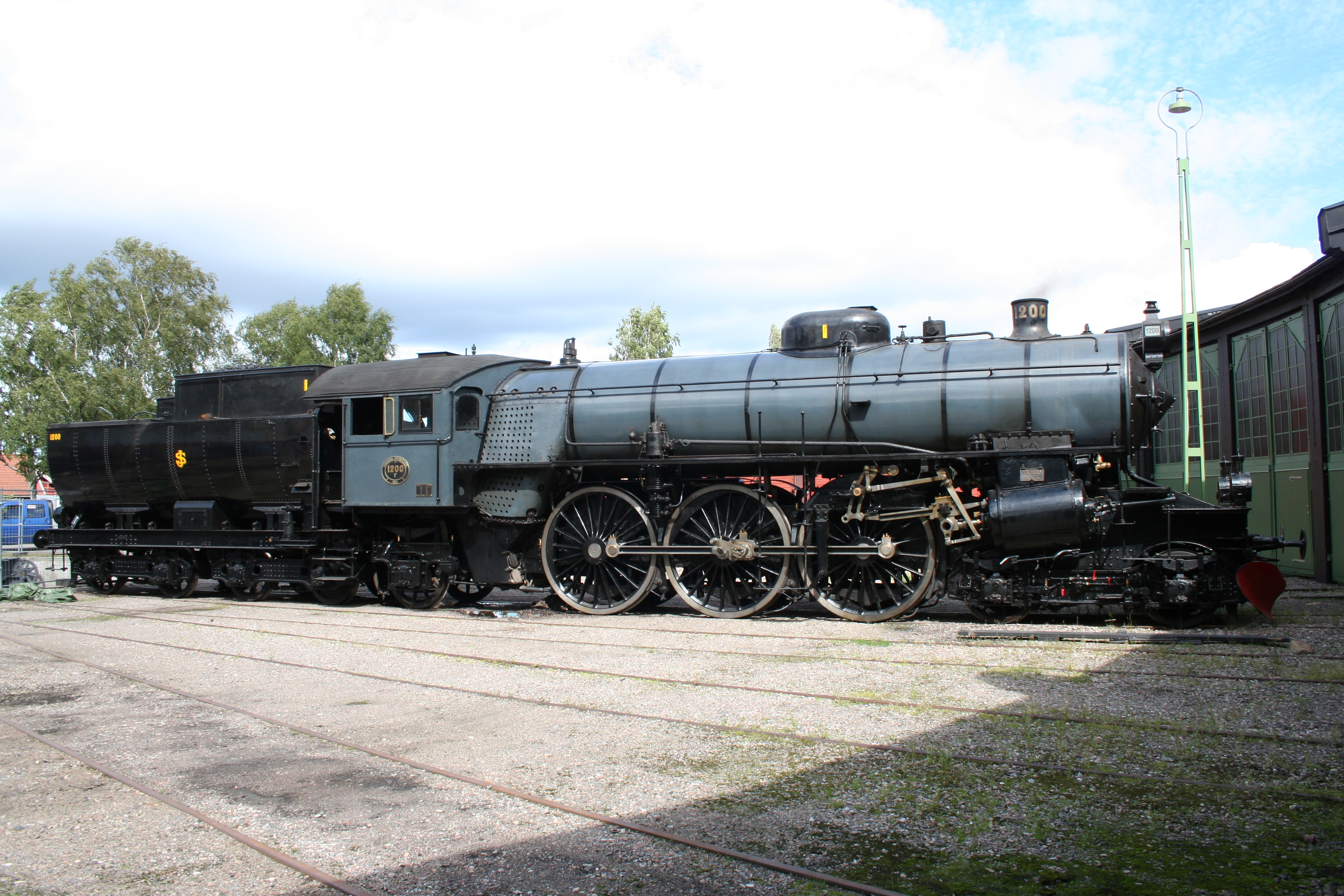 Dampflokomotive F 1200 Gävle 13.08.08